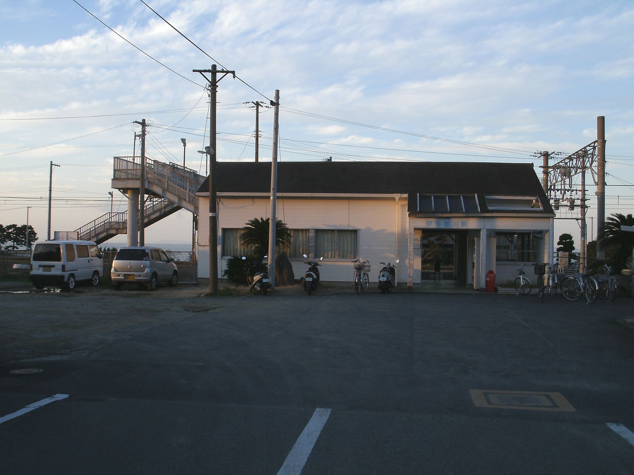 予讃線伊予寒川駅 駅舎 2009年11月4日 Bakkai撮影